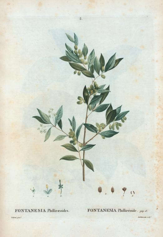 Fontanesia phillyraeoides = Fontanesia Philliréoïde.